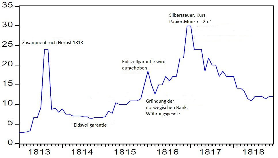 Wert des norwegischen Rigsbankdalers 1813-1818 gegenüber dem gemünzten Daler specie Hamburger banco.